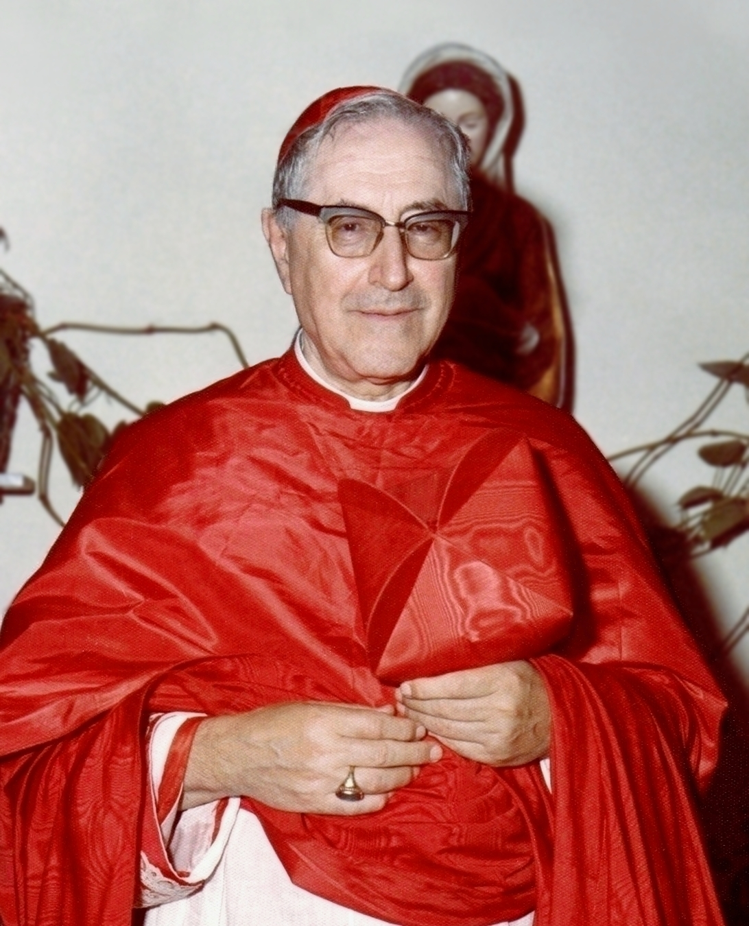 Il cardinale Giuseppe Siri a Genova intorno al 1975